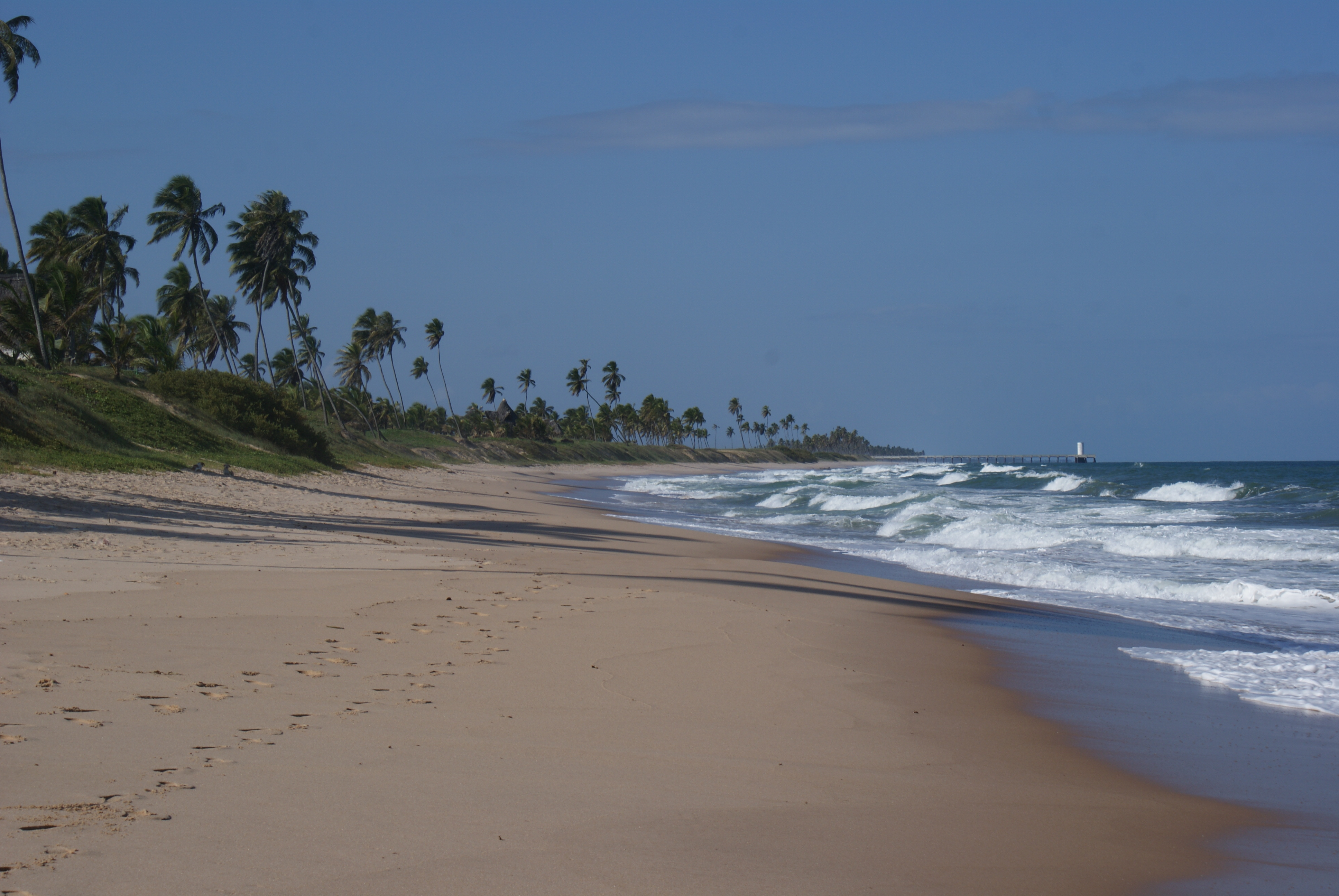 Trip to Salvador & Praia do Forte, Bahia, Brazil